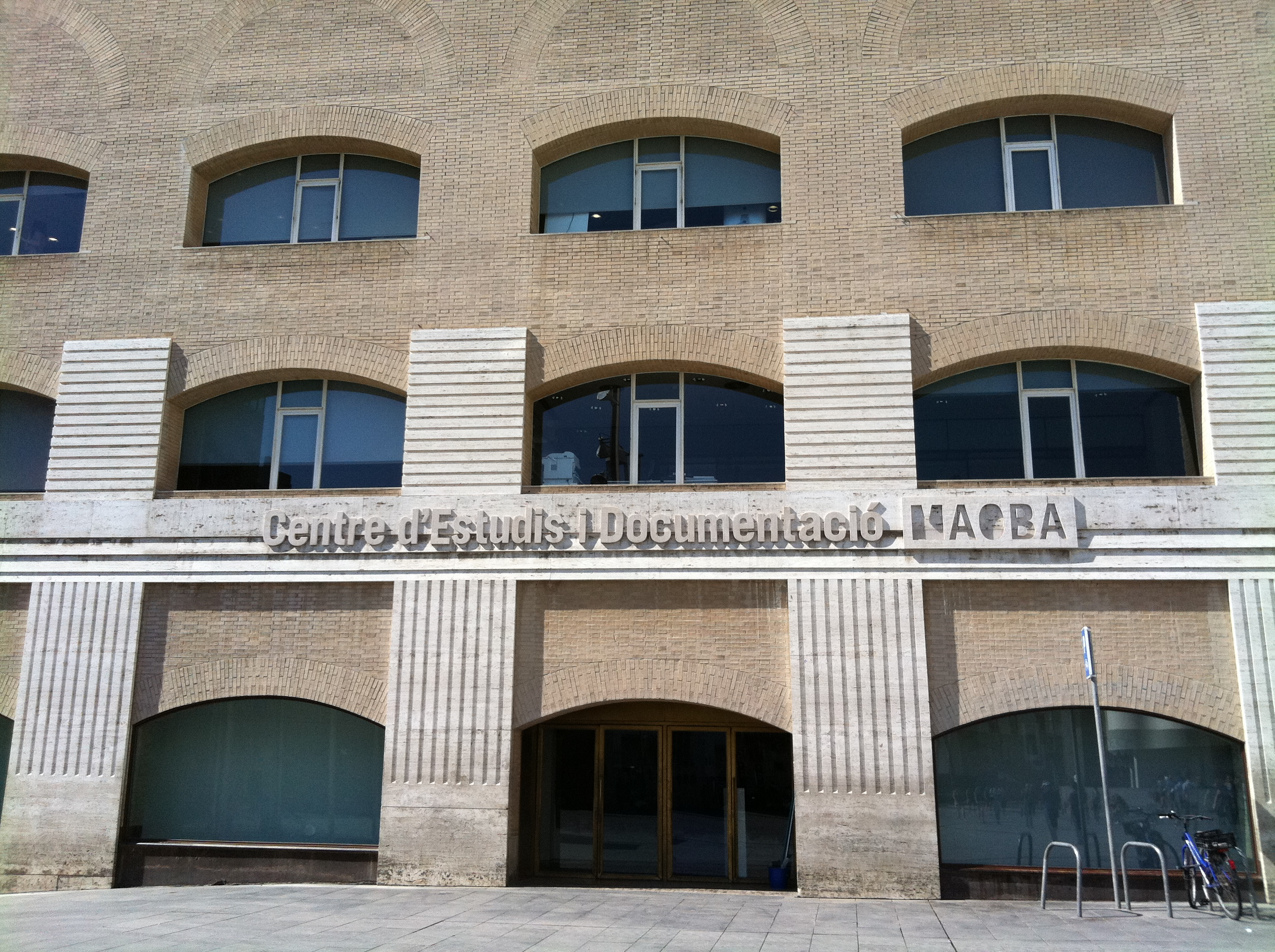 Museu d'Art Contemporani de Barcelona, MACBA